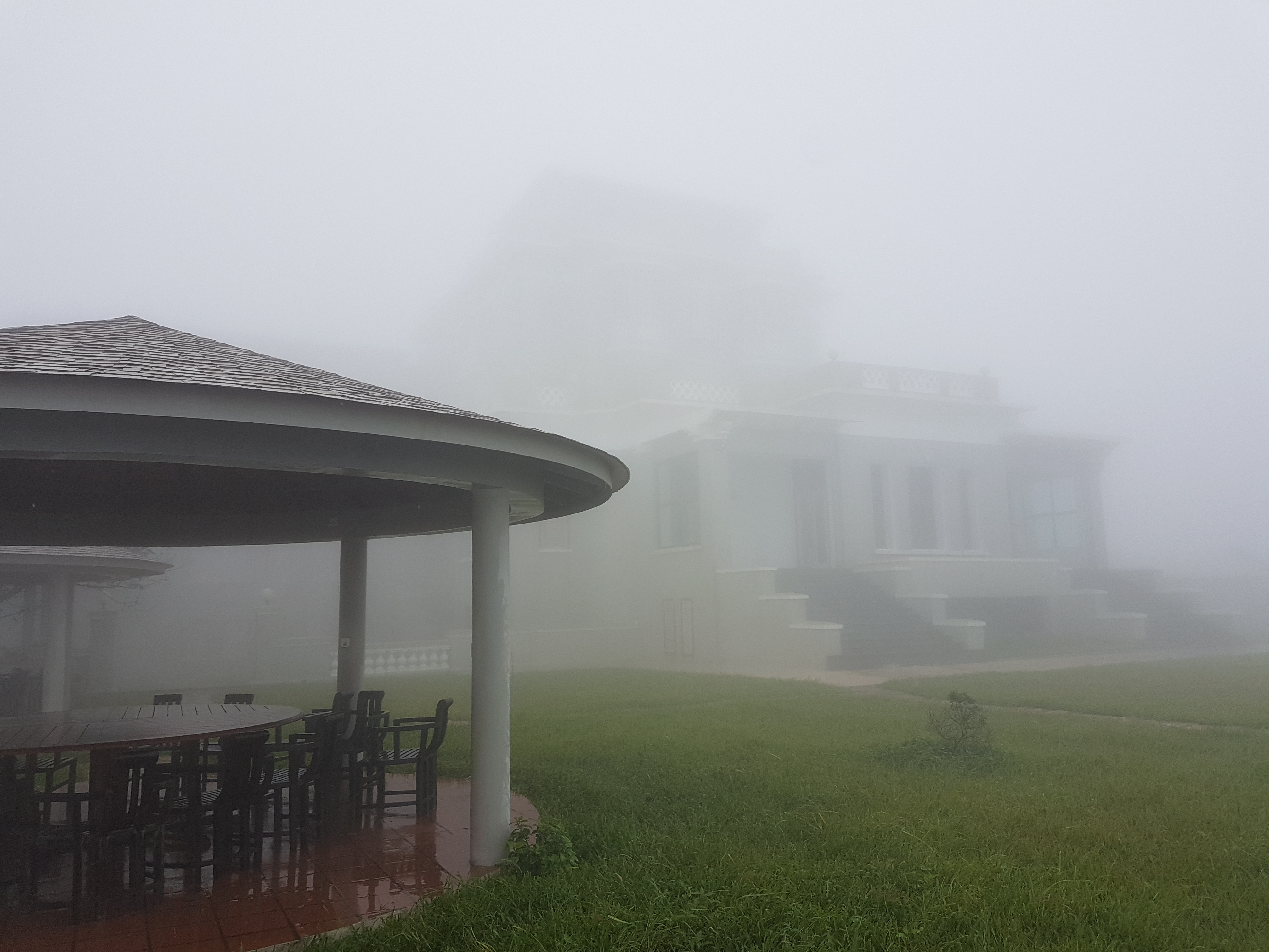 Bokor Palace Hôtel après rénovation dans le brouillard. Août 2018.